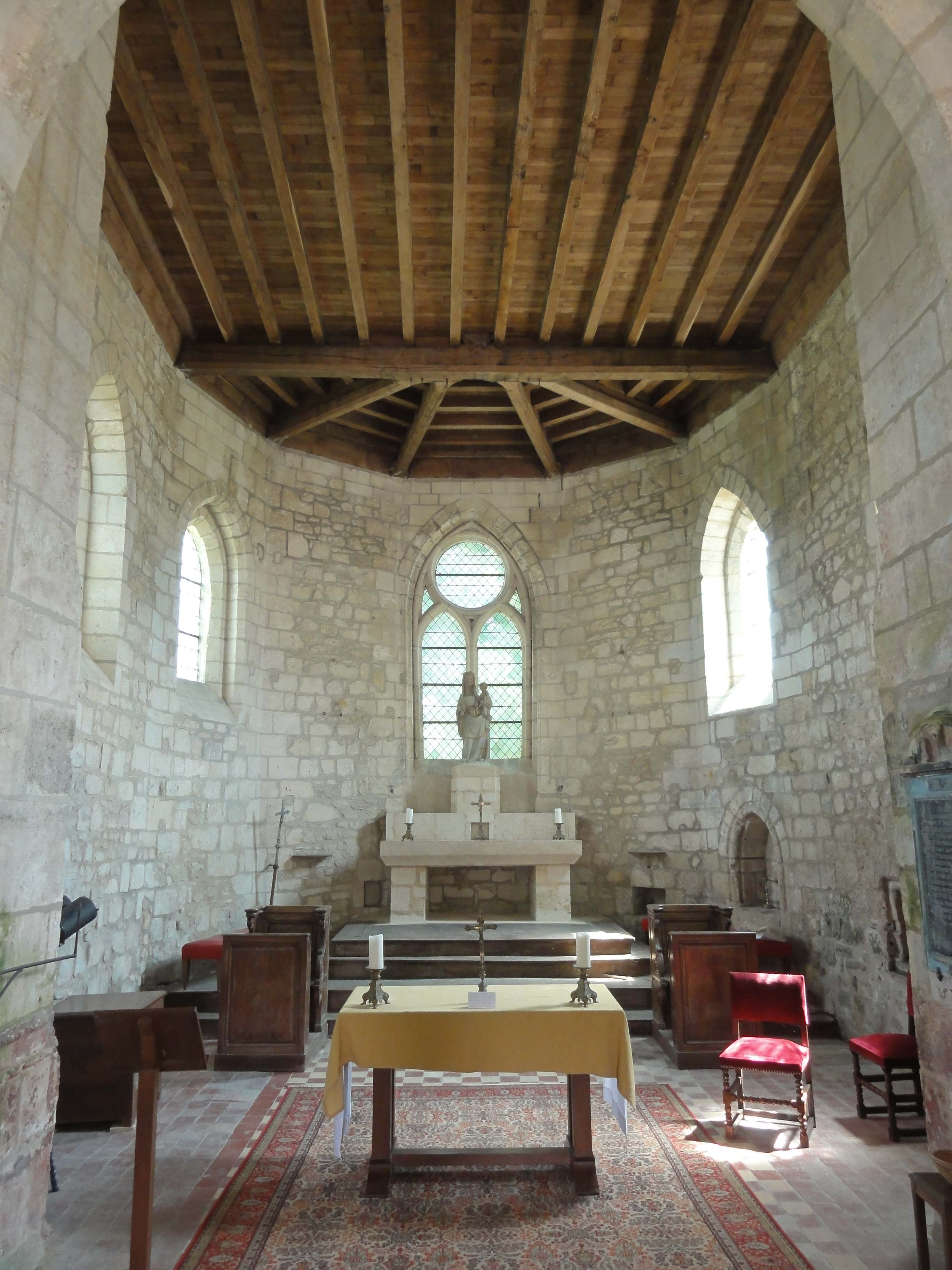 Intérieur de l'église (voir titre).